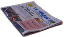 Une de La Presse de la Manche